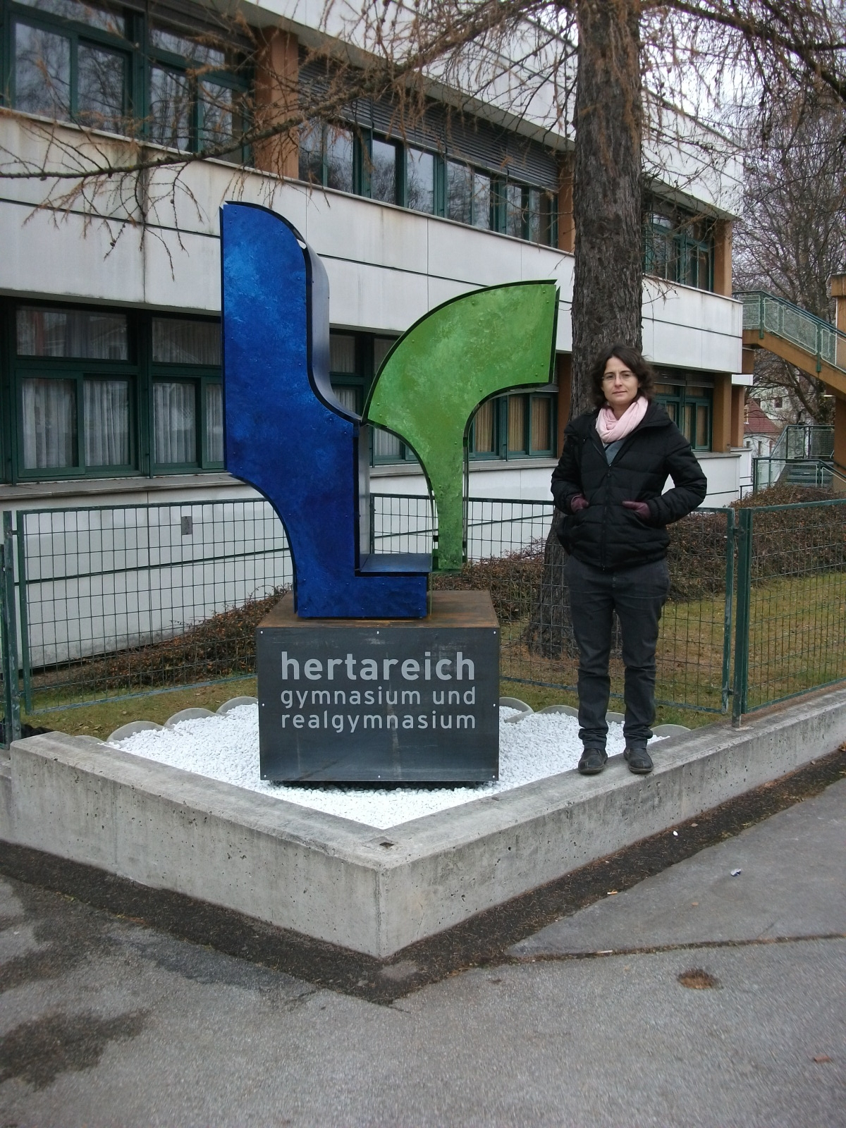 הכניסה לבית הספר התיכון על שם הרטה רייך מירצצושלאג אוסטריה